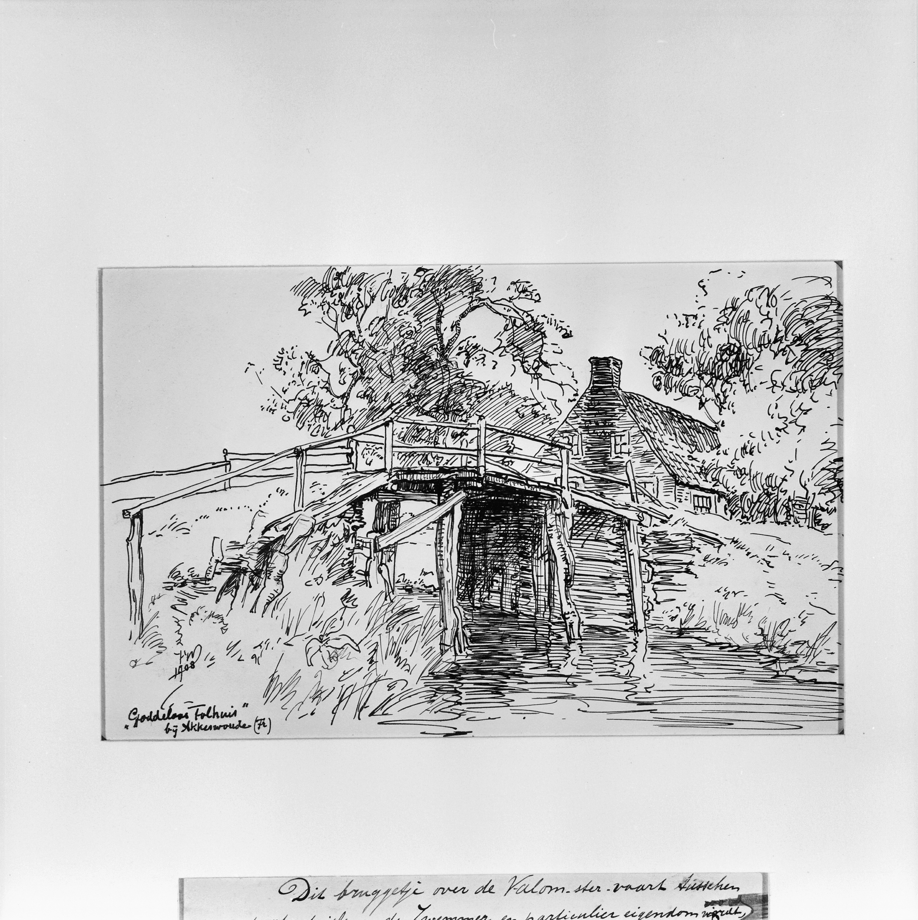 Goddeloos Tolhuis: Tekening van brug bij het tolhuis (opmerking: Reproductie van tekening van I. Wiersma uit de collectie van het Fries Museum Leeuwarden)